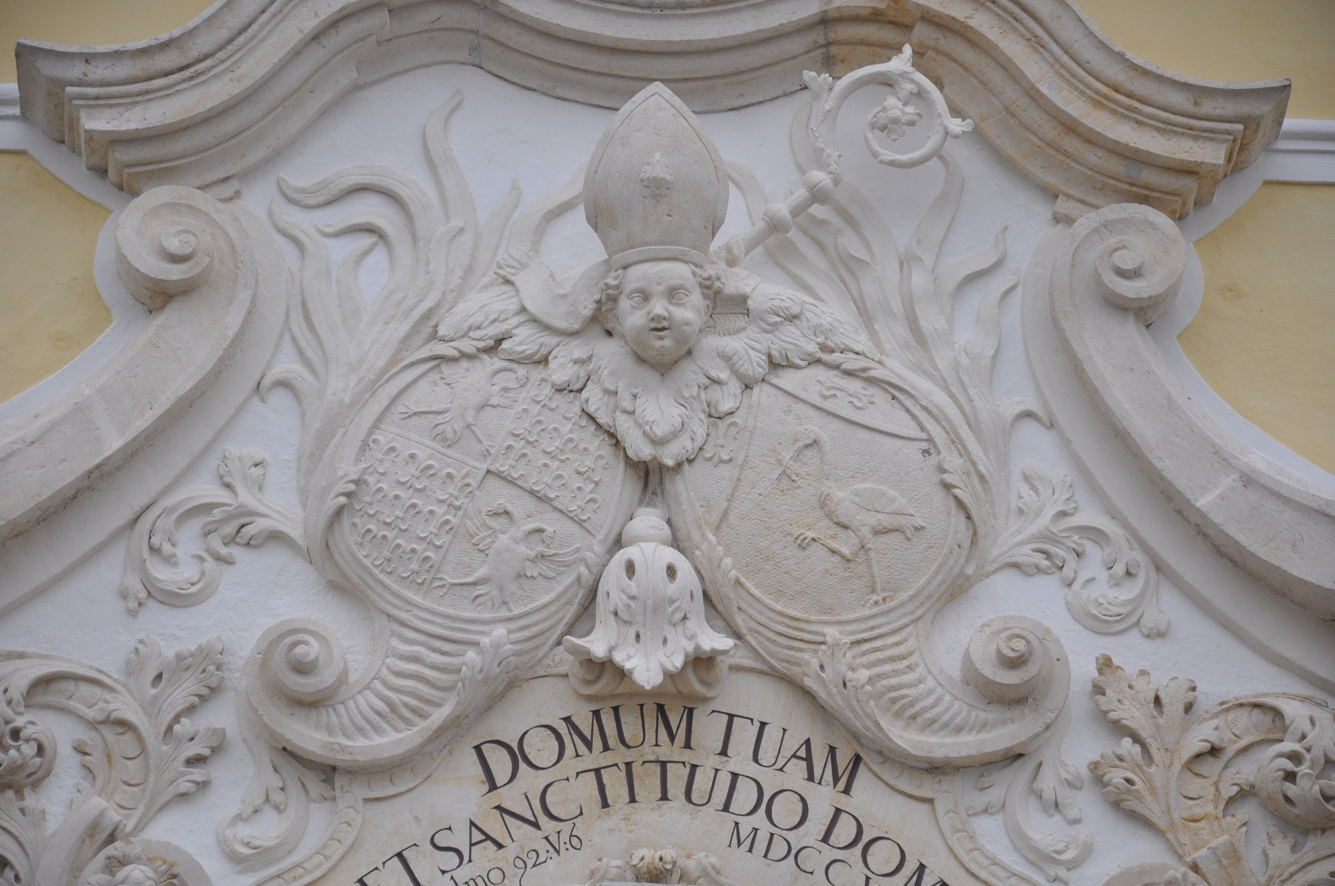 Klosterkirche Metten Portal, Detail: Klosterwappen und Wappen des Abts Roman Märkl, 1724